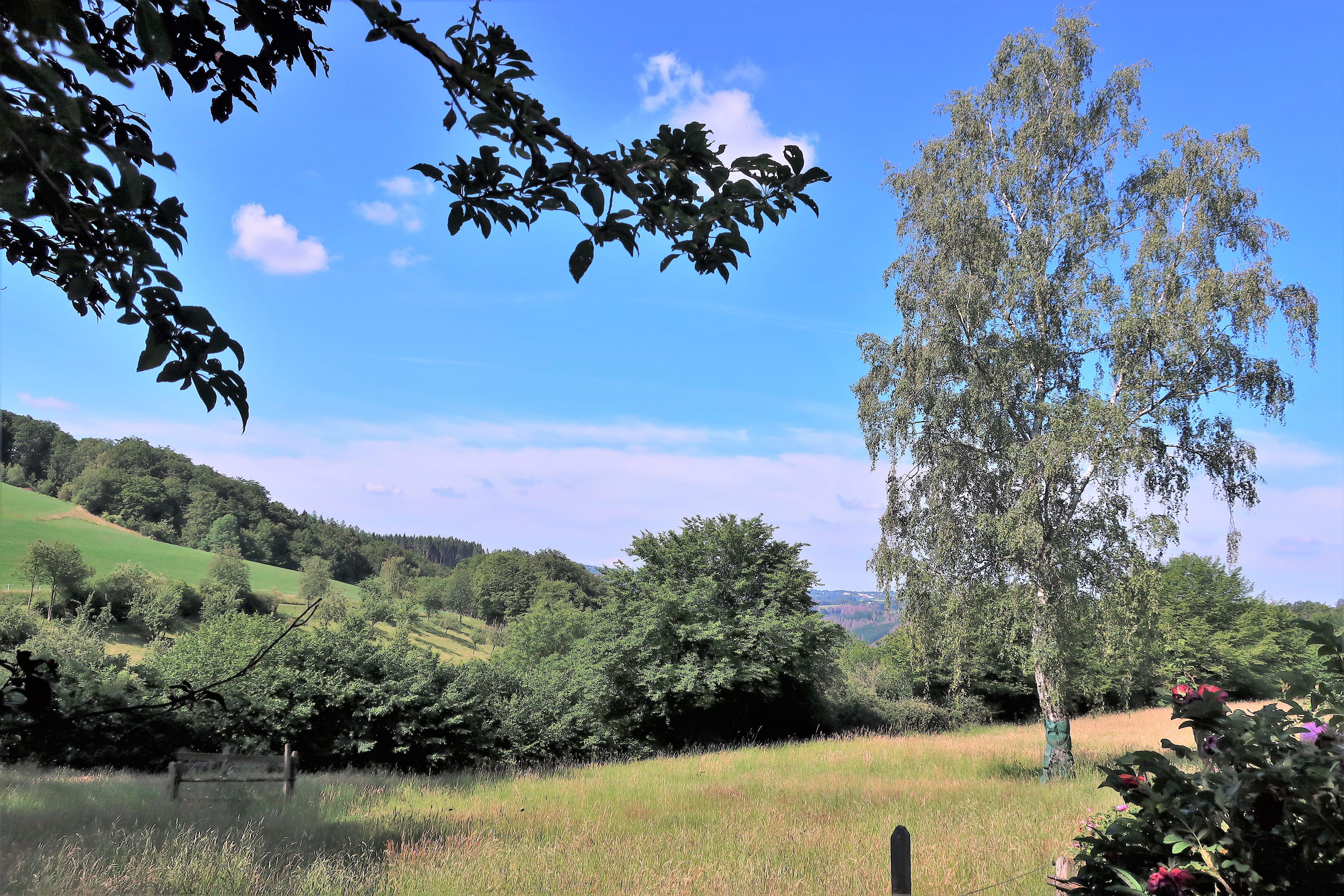 Geschützter Landschaftsbestandteil 1.4.2.87 „Rumscheid“ in Hagen, westlich von Rumscheid. Es handelt sich um eine feuchte Wiese mit randständigen Hecken sowie um ein Kleingewässer.